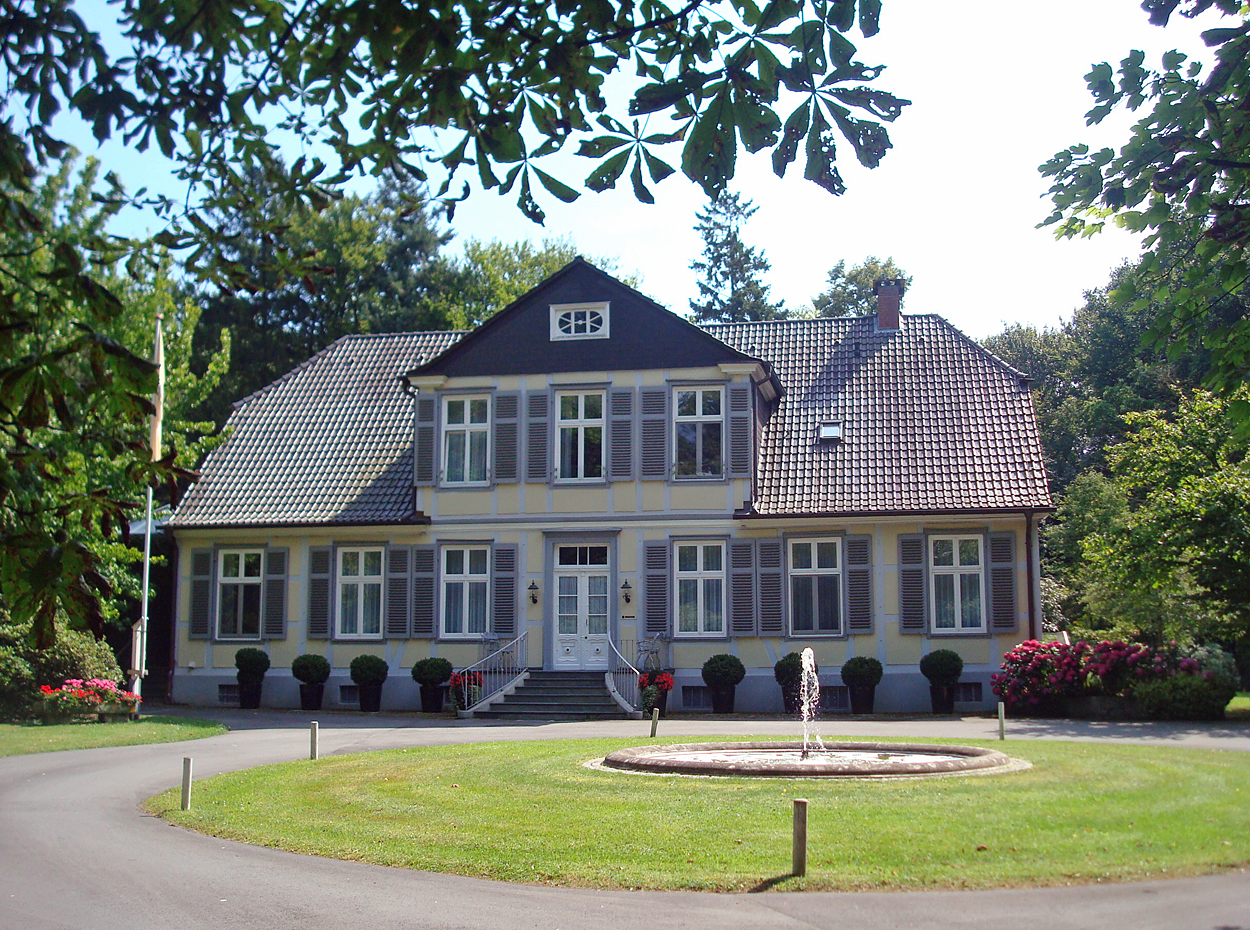 Meierhof Gütersloh/Merklinghaus This is the photograph of an architectural monument. It is part of the list of cultural monuments of Gütersloh, no. A 125